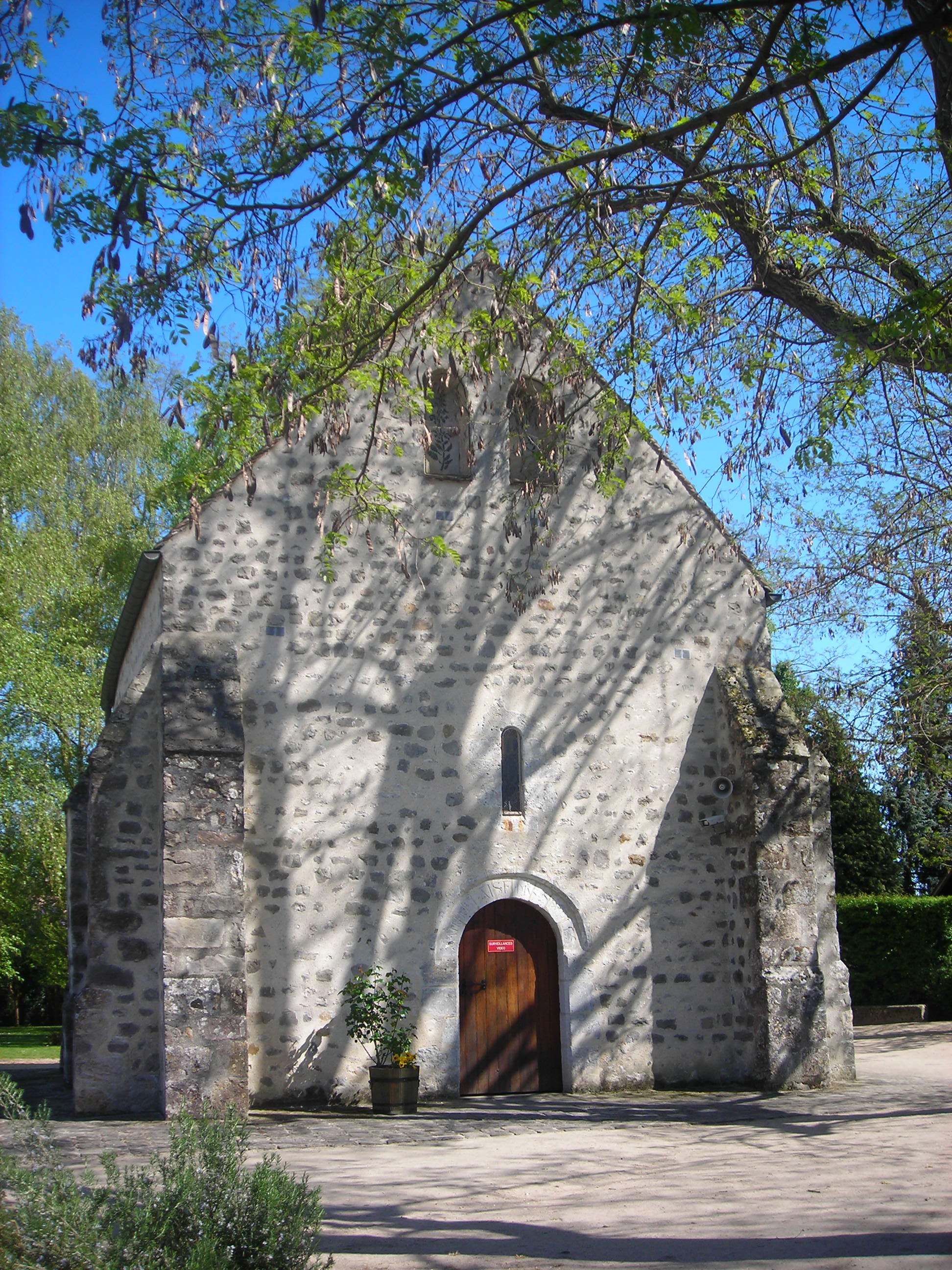 Chapelle Sainte-Blaise des Simples de Milly-la-Forêt